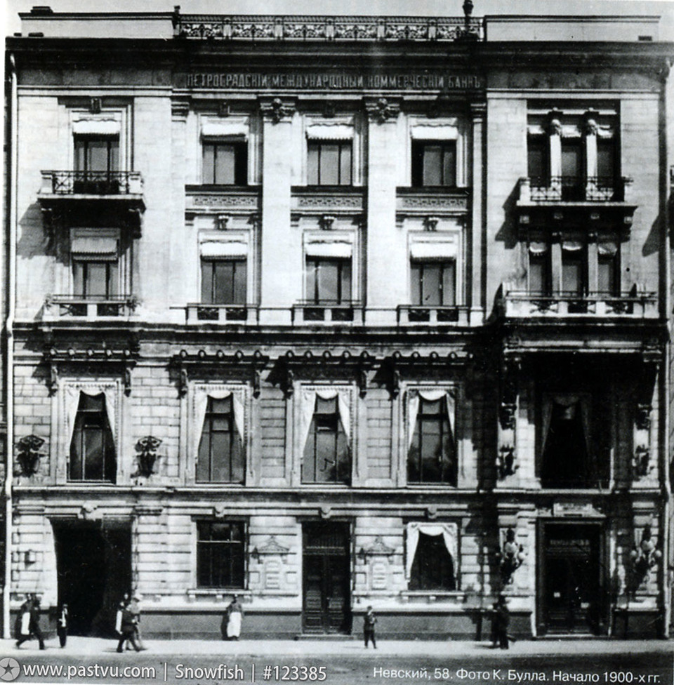 Здание Петроградского международного коммерческого банка, 1915 год.